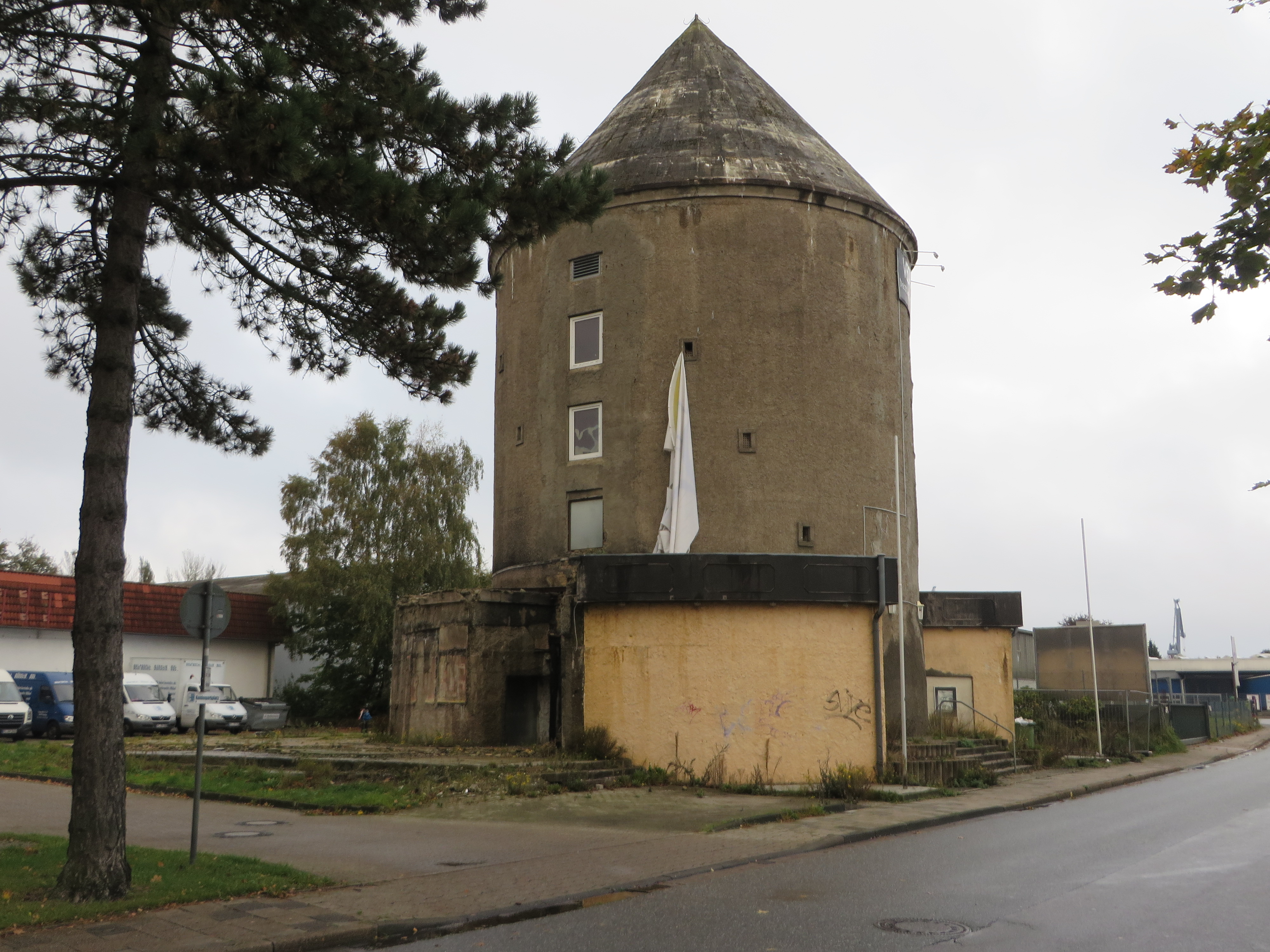 Trollturm Süd (Trollseelager II), der Bunker in der Steinstraße beim Trollseeweg (Flensburg 2014), Bild 006